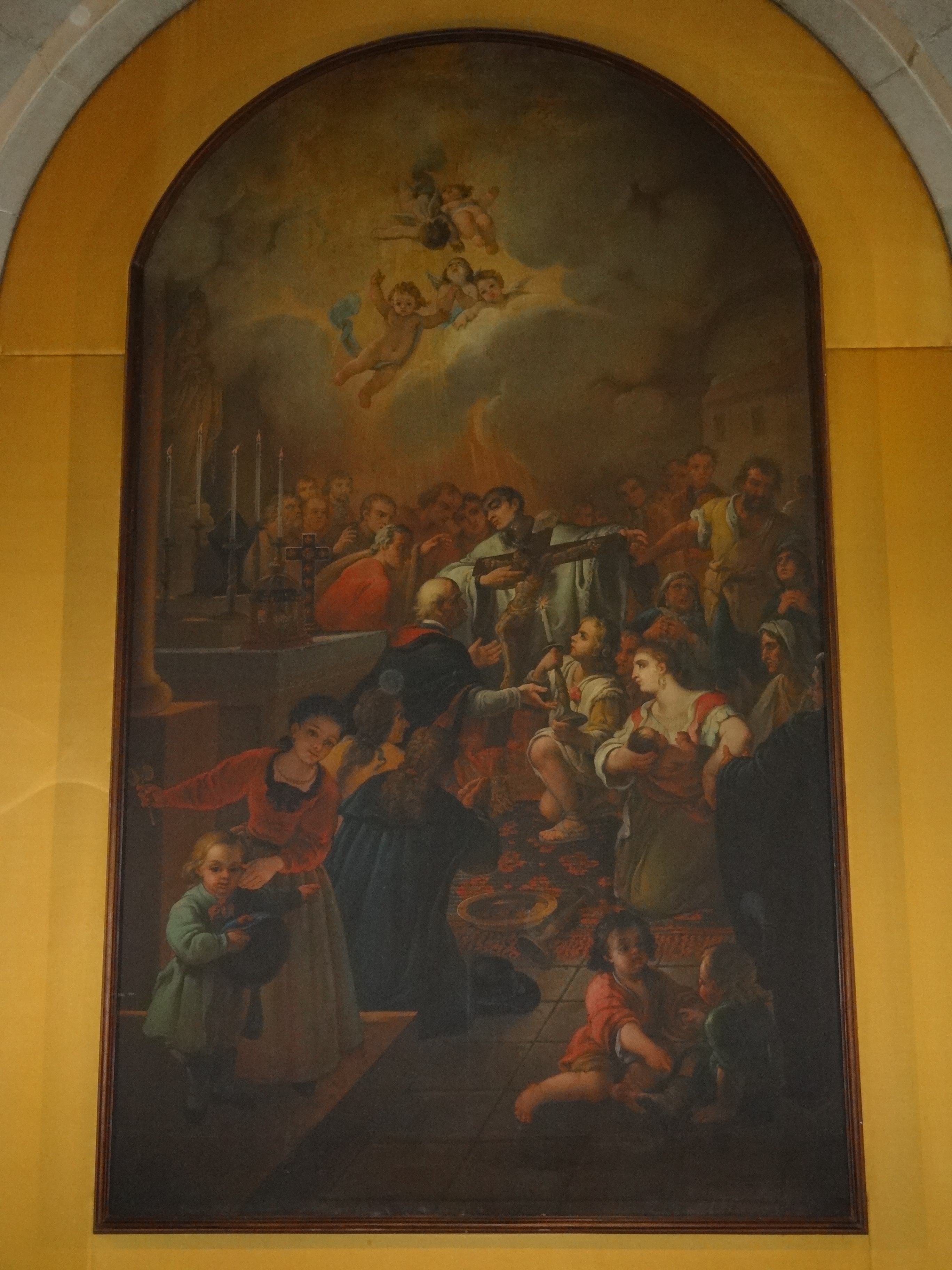 Quadre Al.legoria del Prodigi del Sant Crist (Segimon Ribó i Mir - any 1844) a l'interior de la basílica de Santa Maria, Igualada